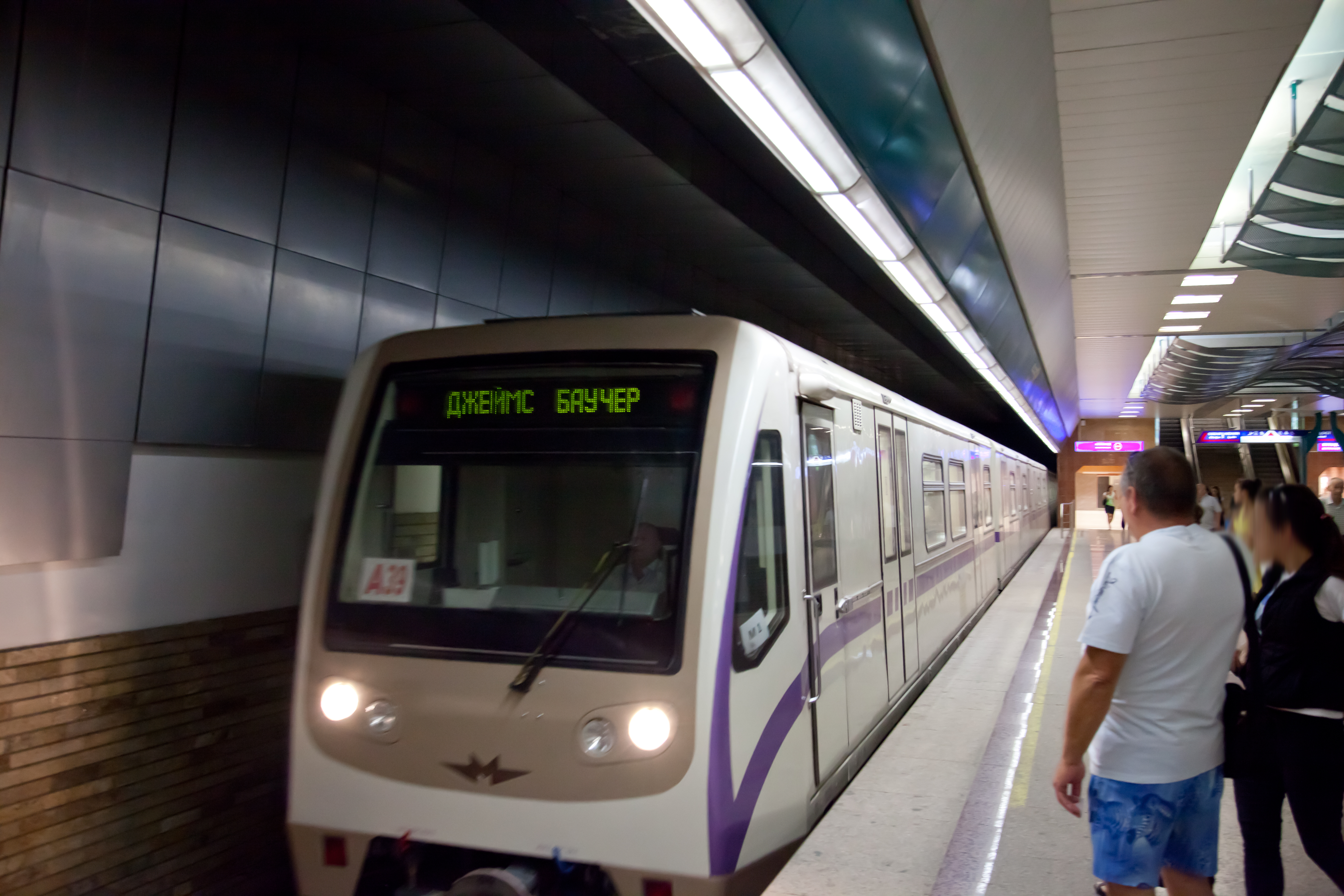 Sofia Metro